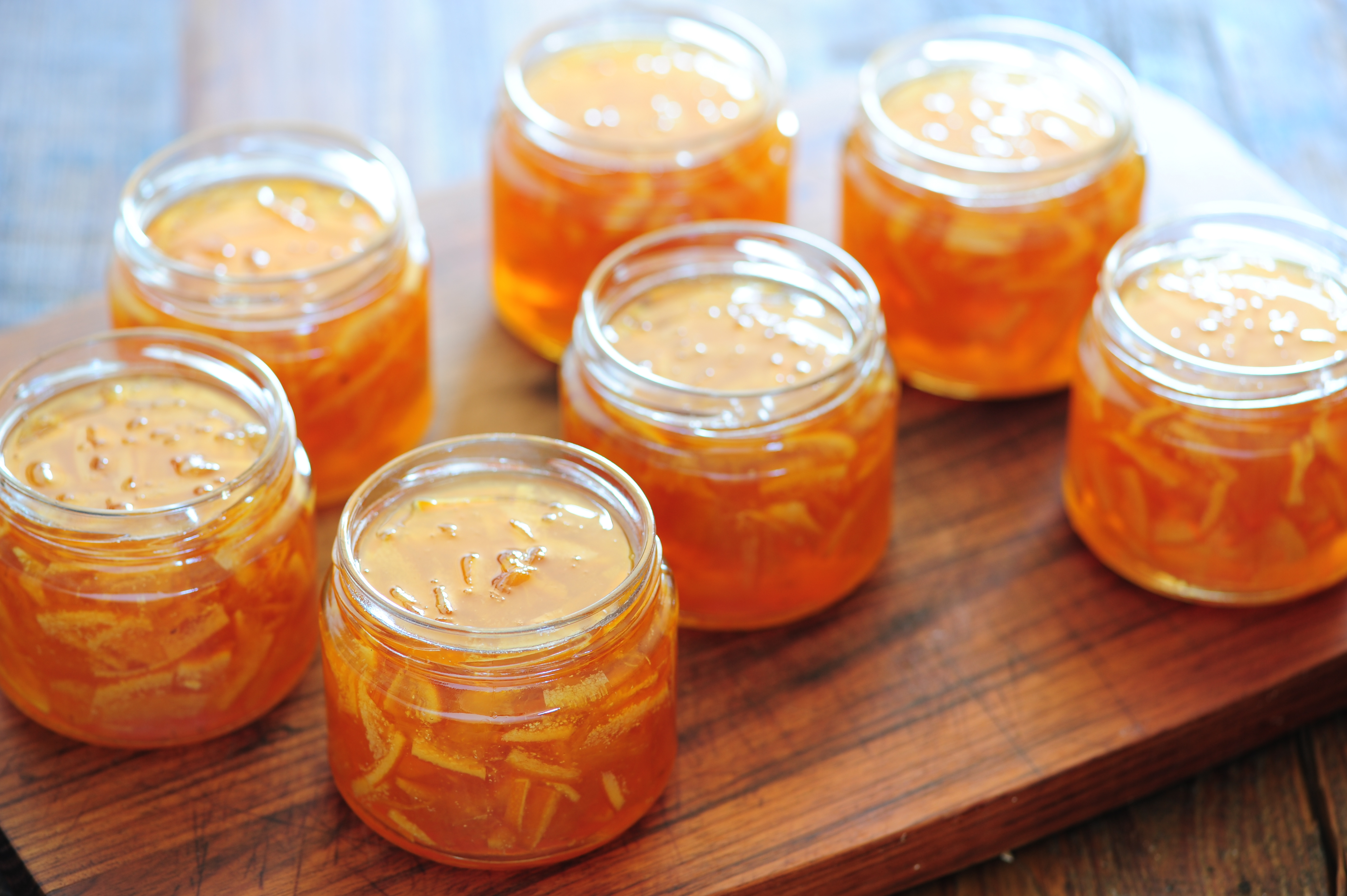 orange marmalade-3